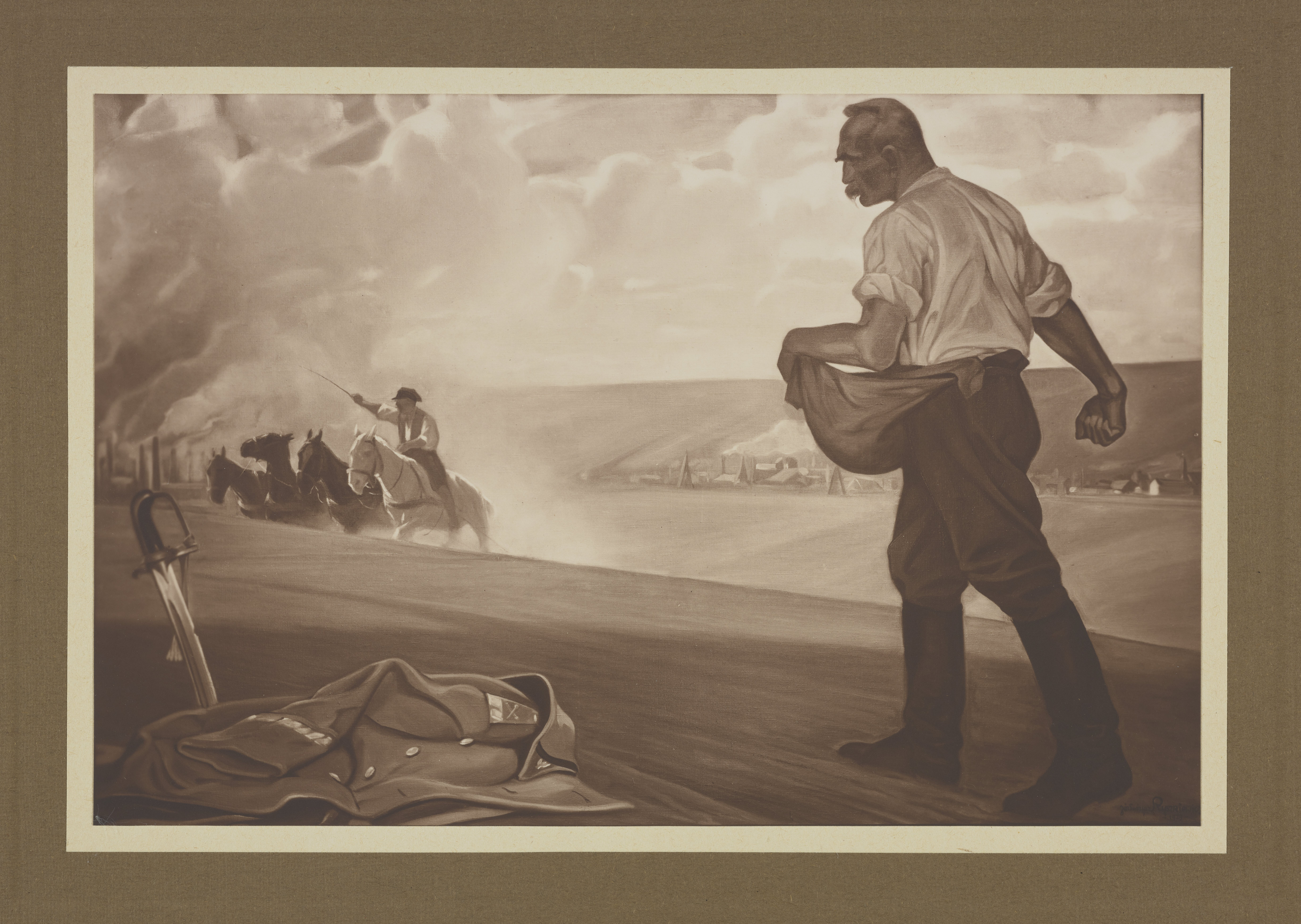 "Józef Piłsudski jako siewca" - Józef "Świrysz" Ryszkiewicz, ok. 1939 r.